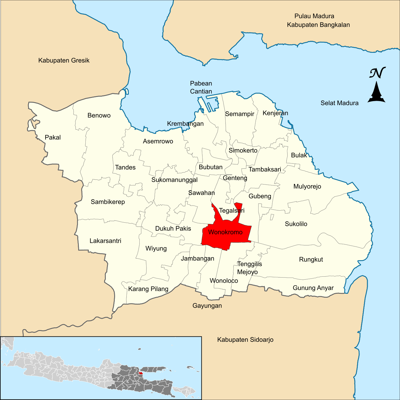 Localização de Wonokromo na cidade de Surabaia